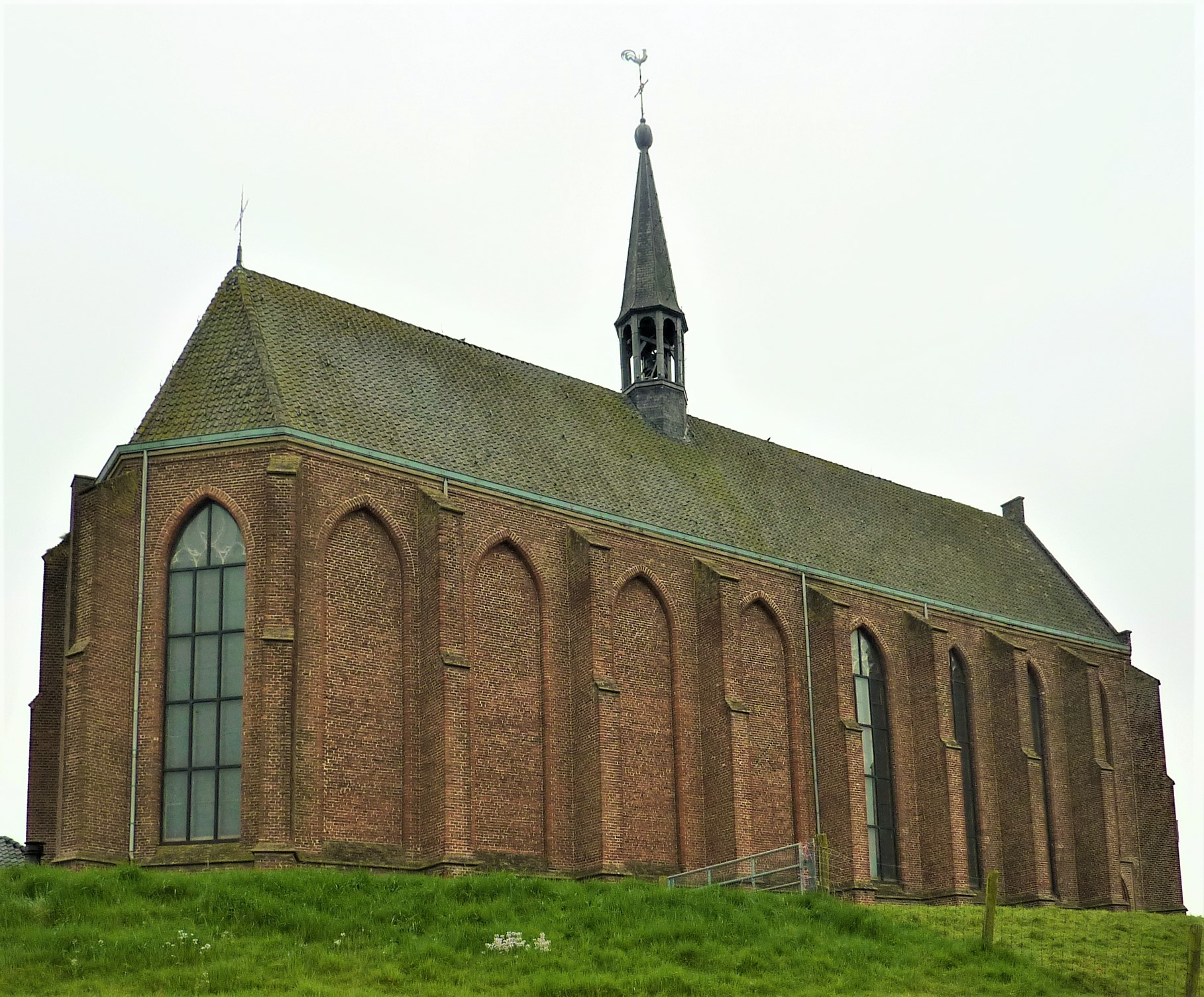 Kruisherenklooster, Sint Agatha